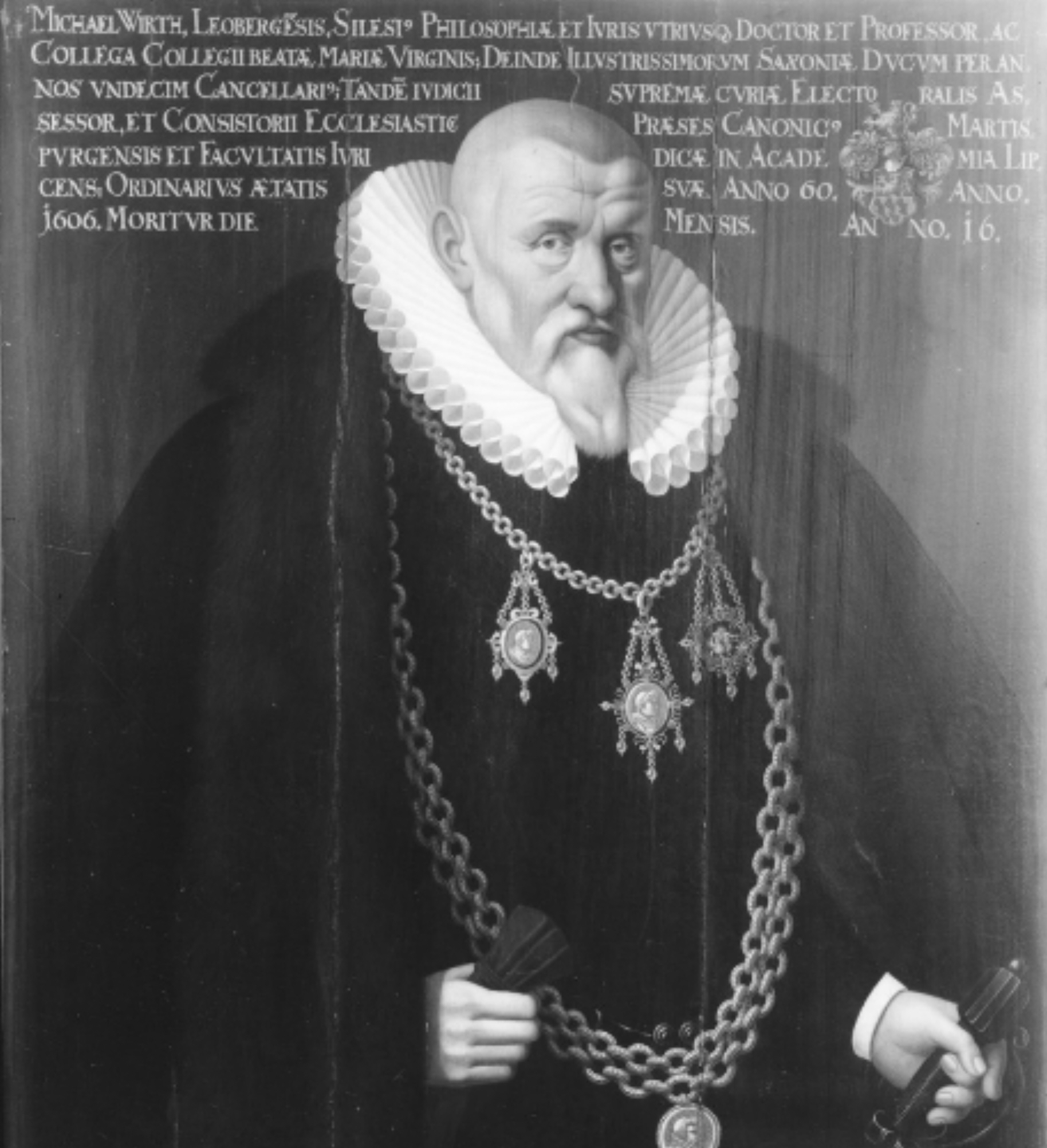 Michael Wirth (* 14. Oktober 1571 in Löwenberg in Schlesien; † 25. Mai 1618 in Leipzig) war ein deutscher Rechtswissenschaftler.